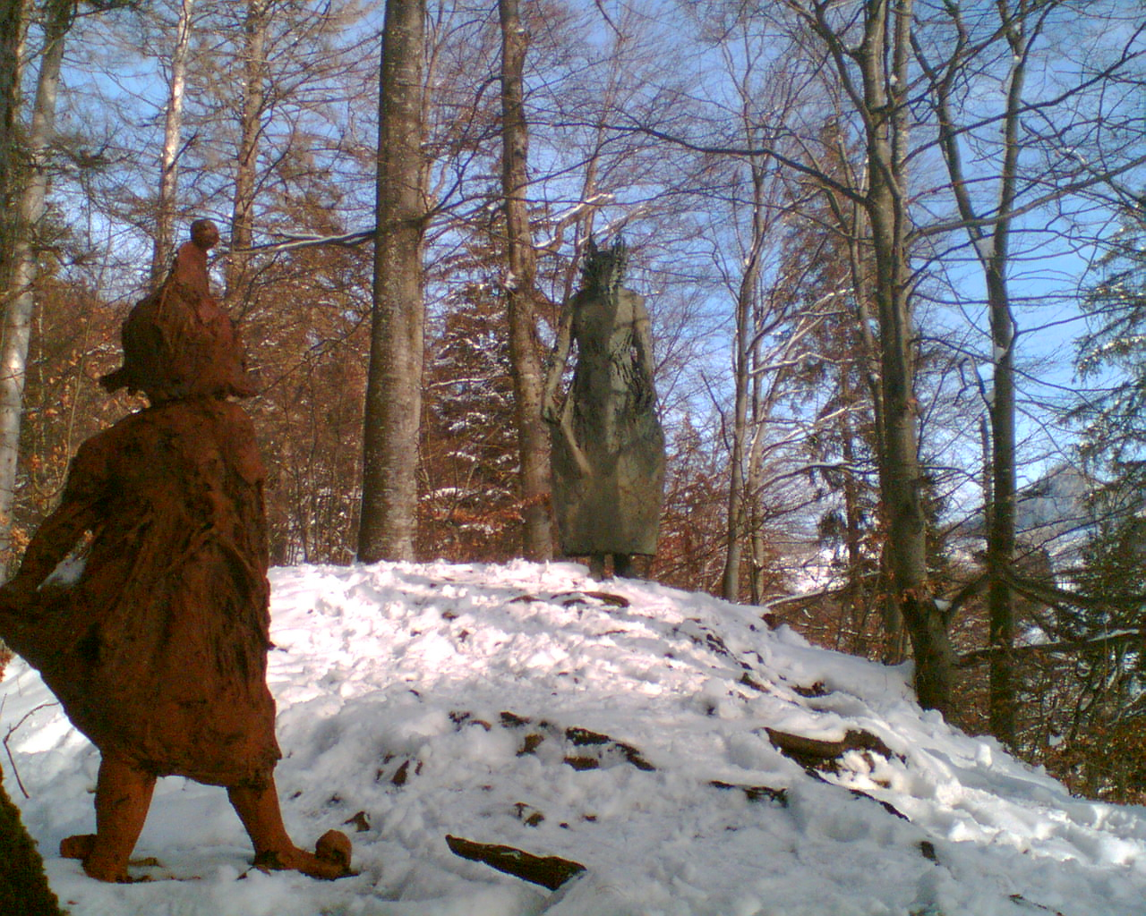 Nicola Hicks, Recovered Memory, 1996/97 - (Walter Pöder, 01/2007), Sculpture at Schoenthal, Langenbruck, Schweiz